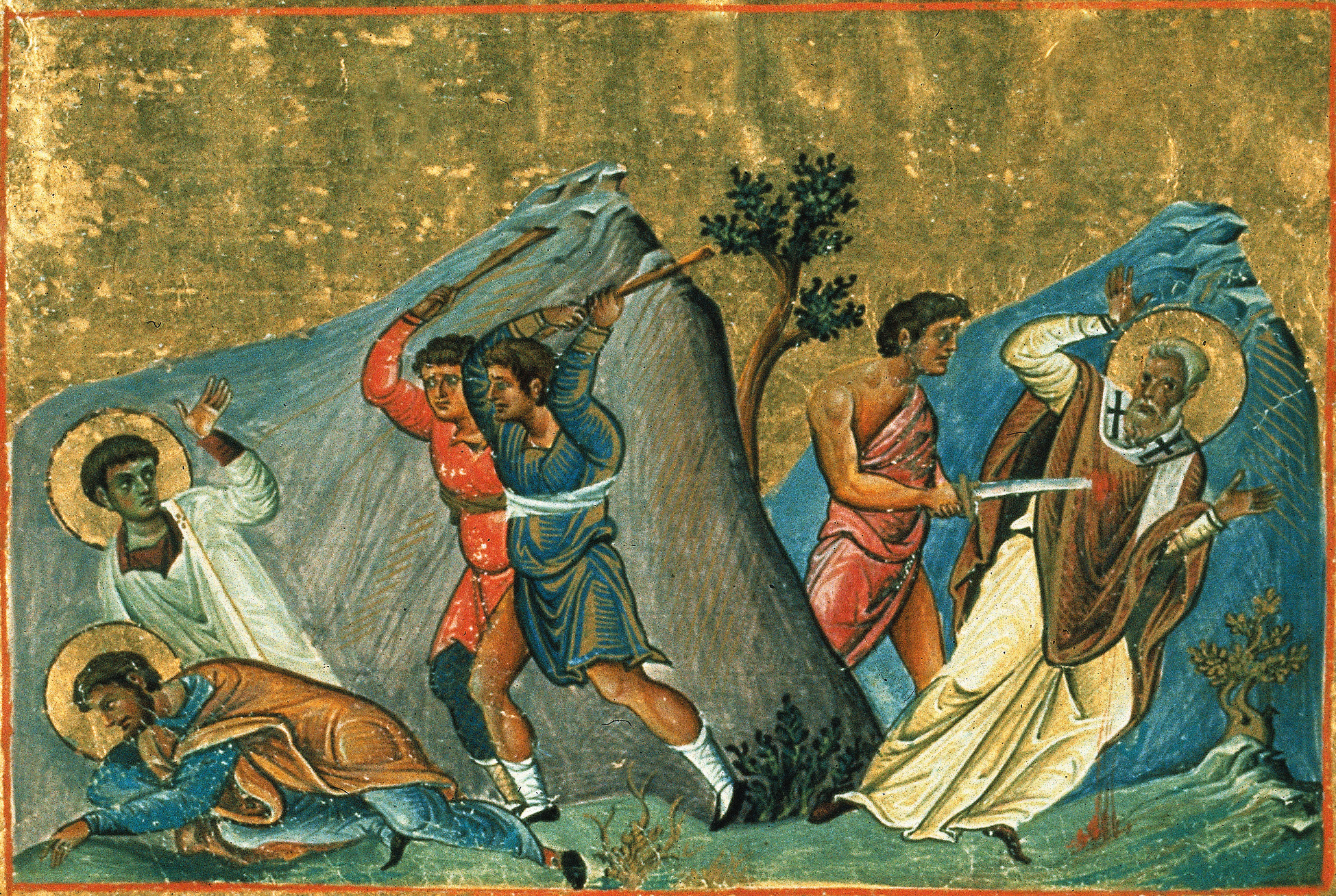 Святитель Милий Персидский, Сузский, епископ, сщмч. Миниатюра Минология Василия II. Константинополь. 985 г. Ватиканская библиотека. Рим